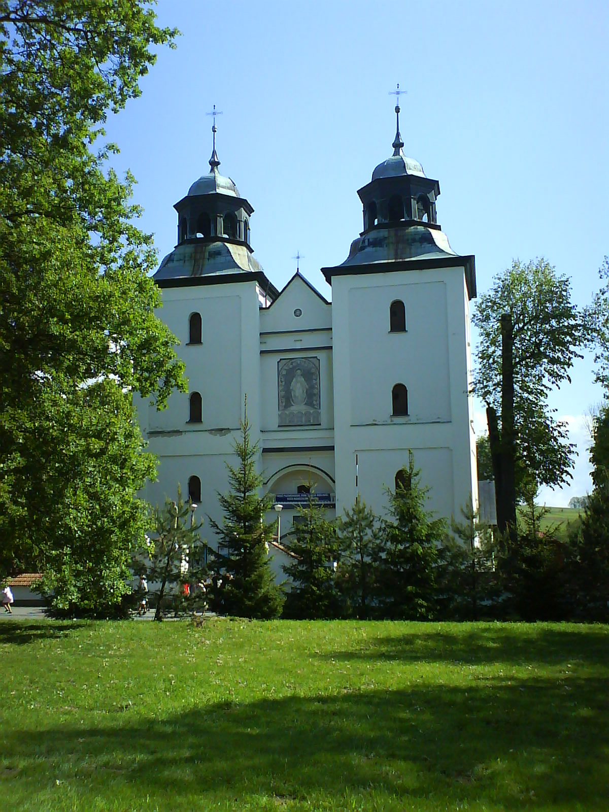 Sanktuarium Maryjne w Rychwałdzie - widok bliski